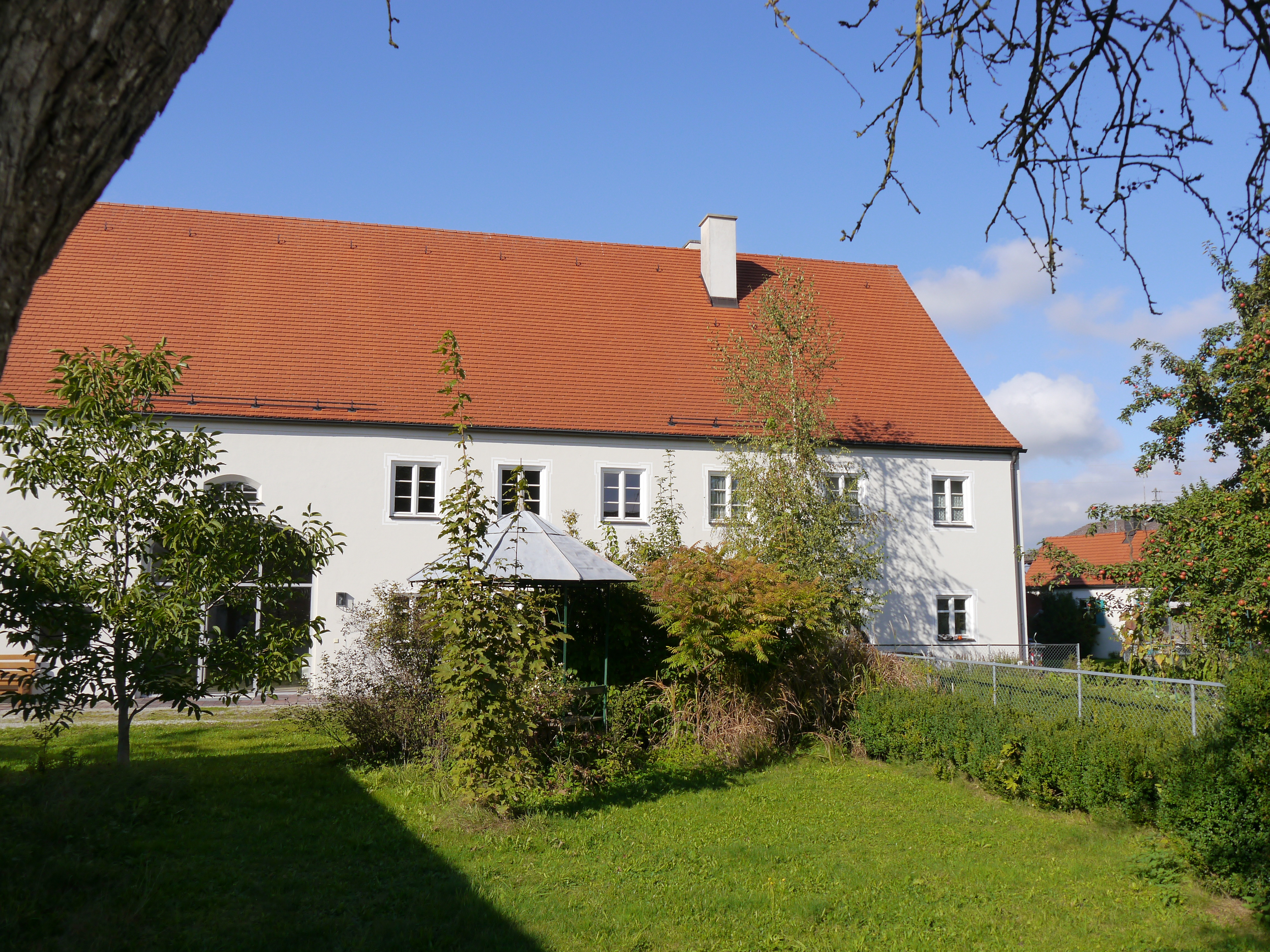 PfarrhausThis is a photograph of an architectural monument.